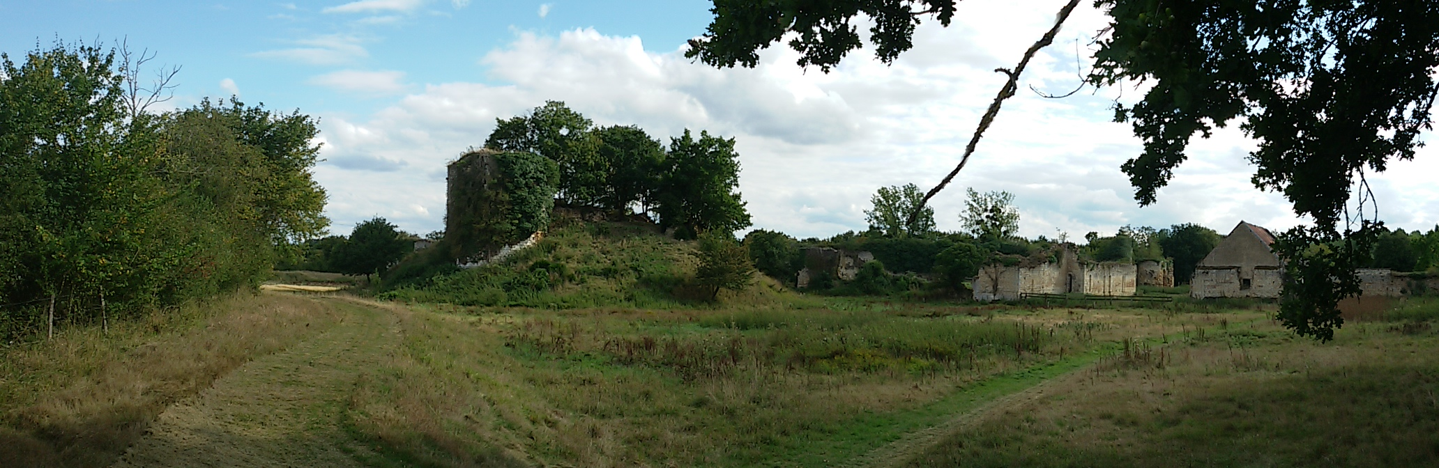 Vue d'ensemble des ruines du château de Bommiers , depuis les anciennes douves.